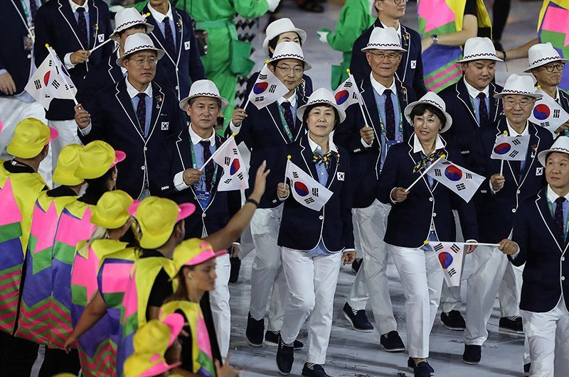 Делегация Южной Кореи на Олимпиаде в Рио-де-Жанейро